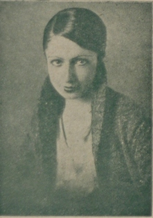 Hale (Salih) Asaf (d. 1905, İstanbul Kadıköy - ö. 1938, Paris Montparnasse), Türk ressam